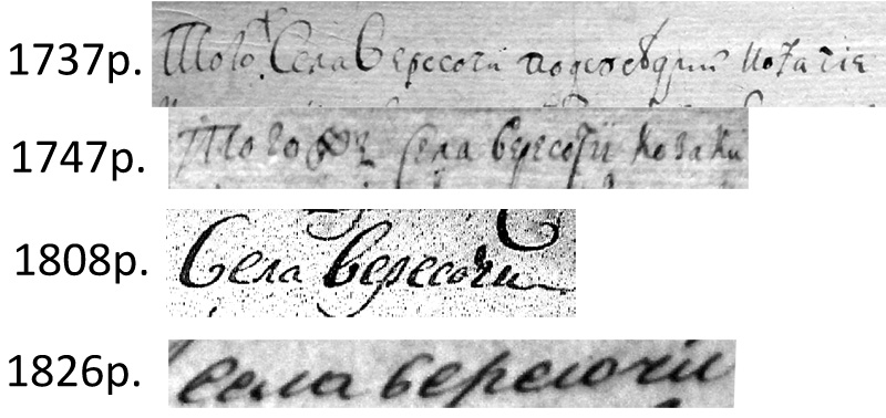 Назва Вересочі в історичних документах